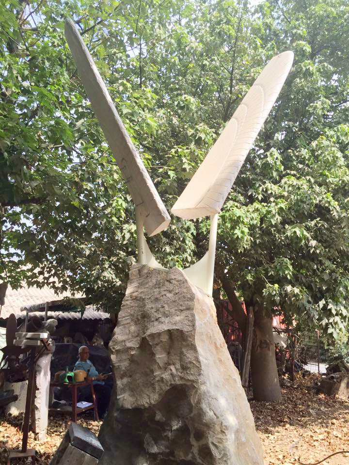 חמישה מטר על 1.5 מטר חומר: אבן דולומיט משקל: 5 טון מיקום: קיבוץ איילת השחר